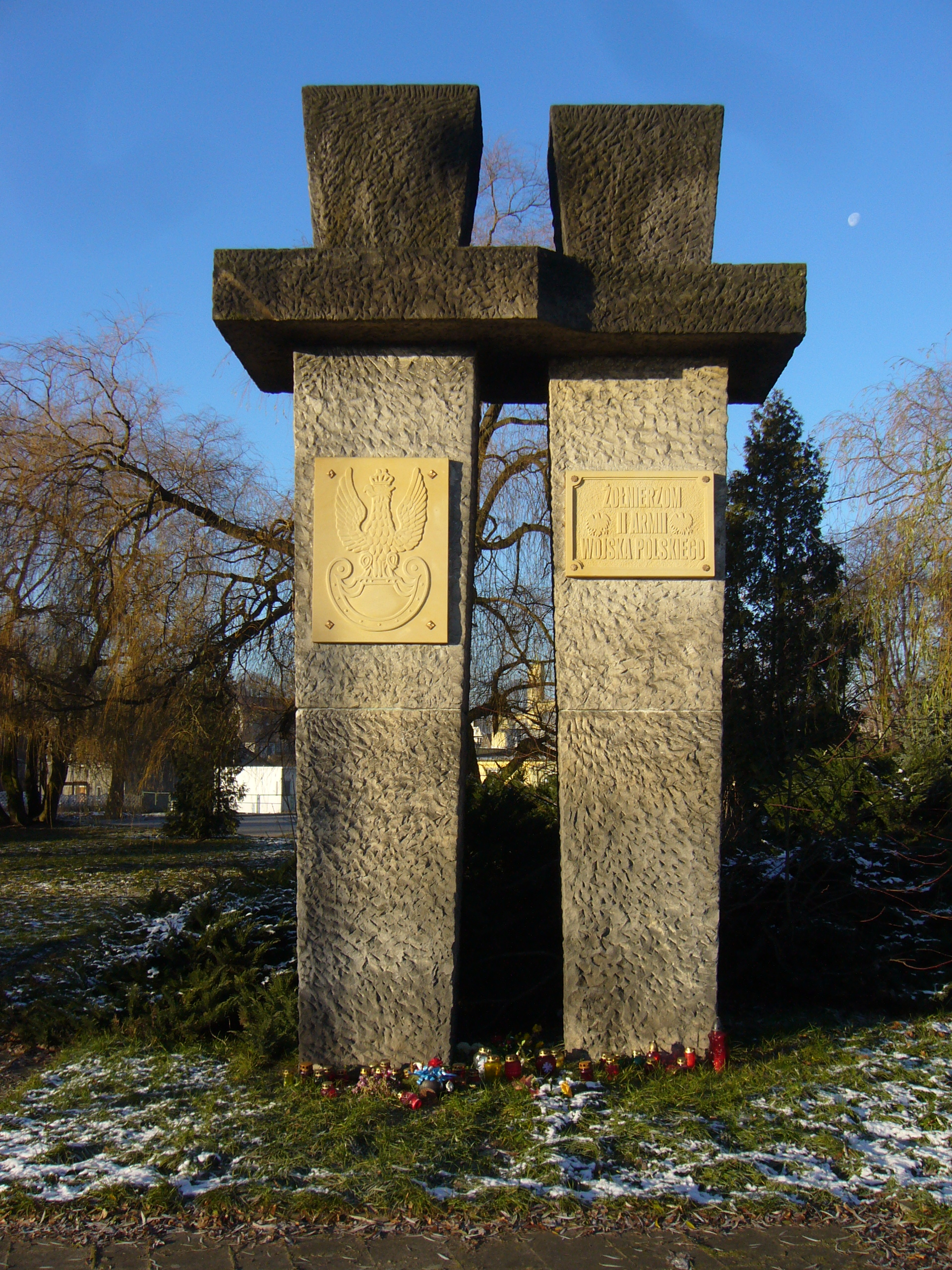 Pomnik Żołnierzy II Armii Wojska Polskiego